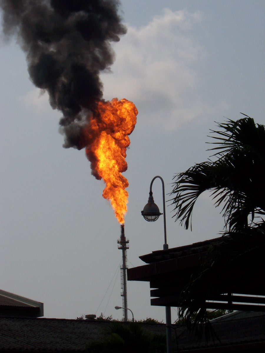 Flame at PTT (ปตท.) (Map Ta Phut, Rayong, Thailand)